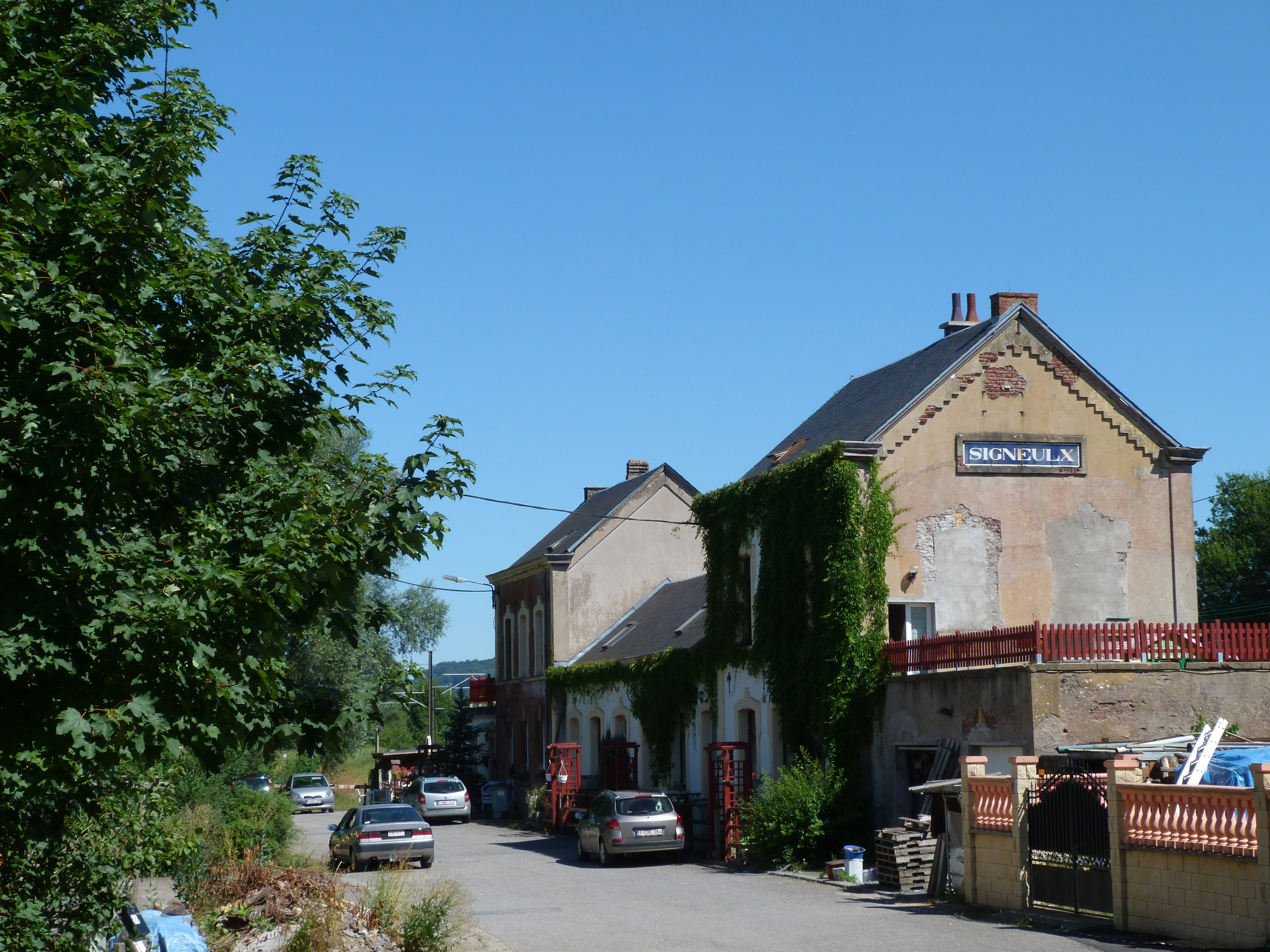 L'ancienne gare de Signeulx, aujourd'hui résidence privée, ici en août 2013.